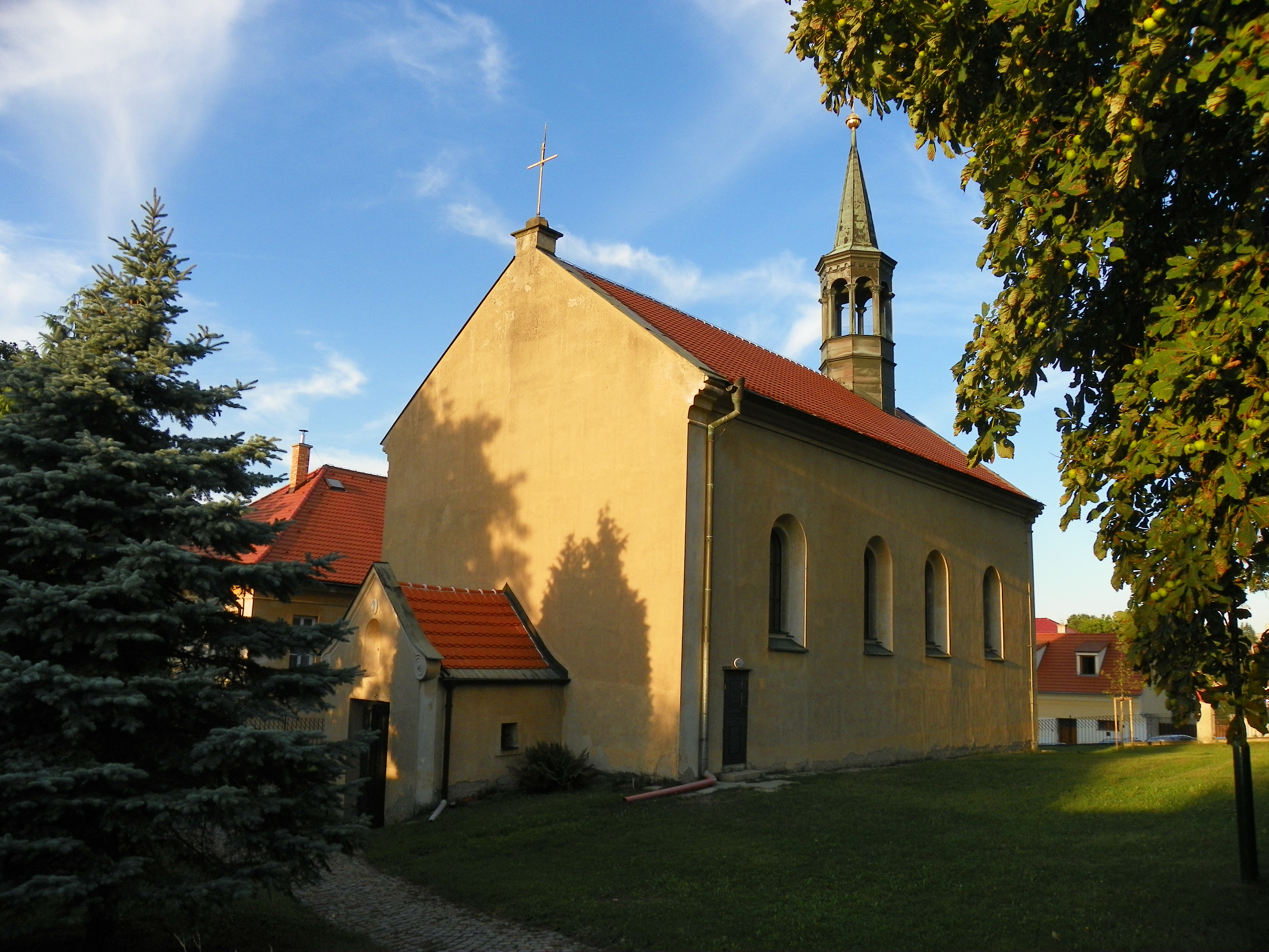 Kostel Stětí svatého Jana Křtitele, Praha 15-Hostivař, Selská, Hostivař